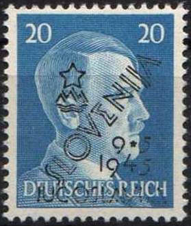 Почтовая марка выпущенная в Мариборе (Словения)